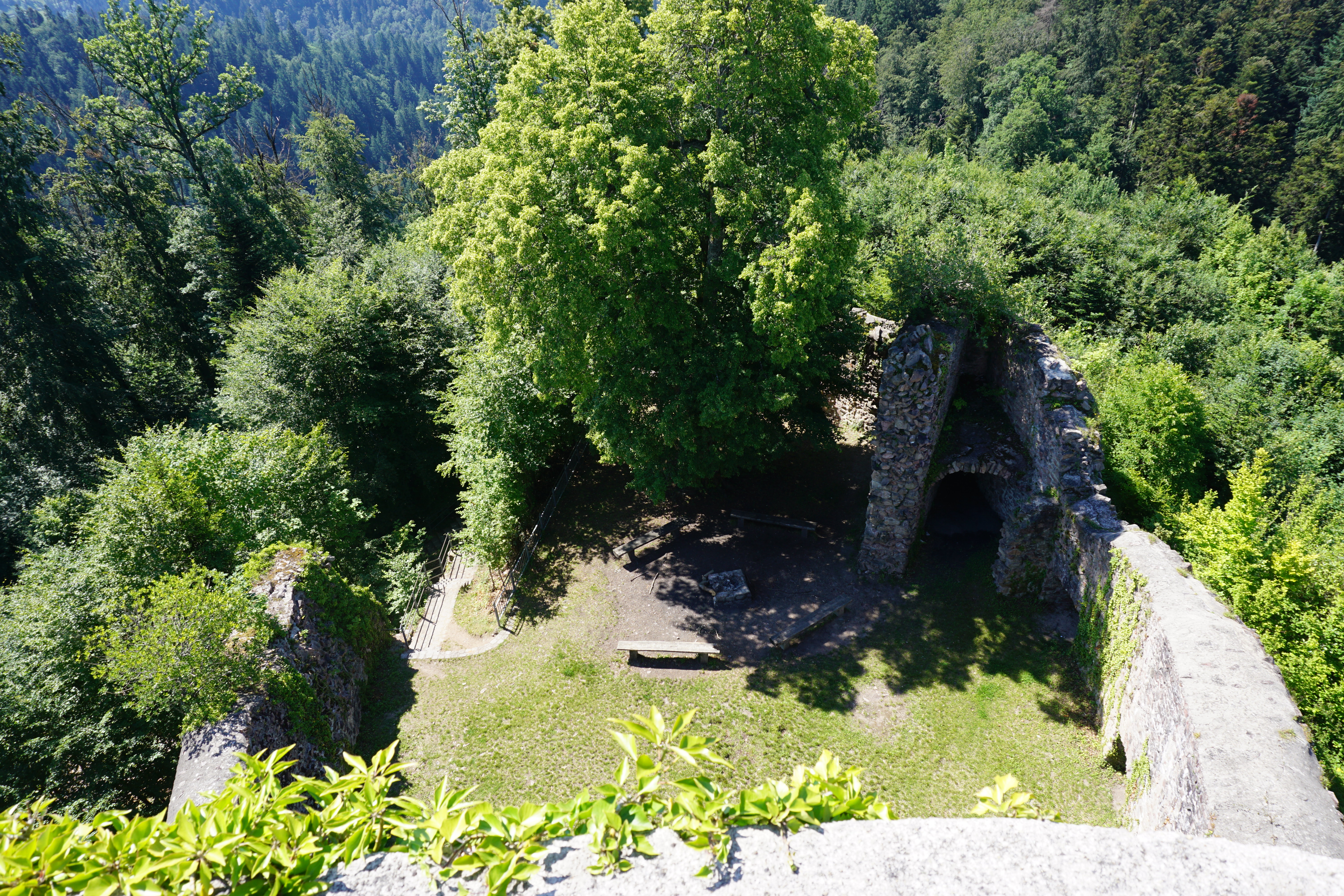 Blick vom Bergfried der Sausenburg auf Burghof und Palas.